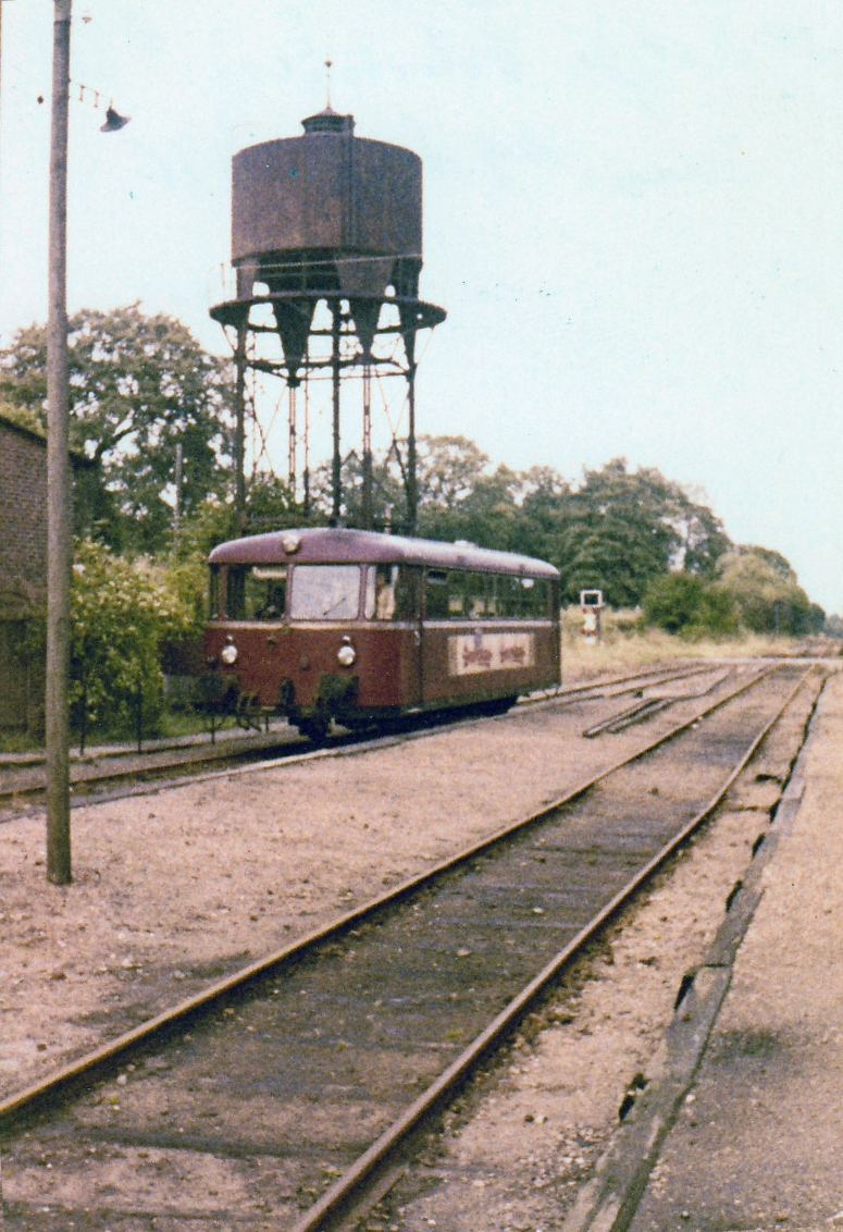 Letzter EBO-Zug 450 am 29091973 in Wakendorf-Götzberg